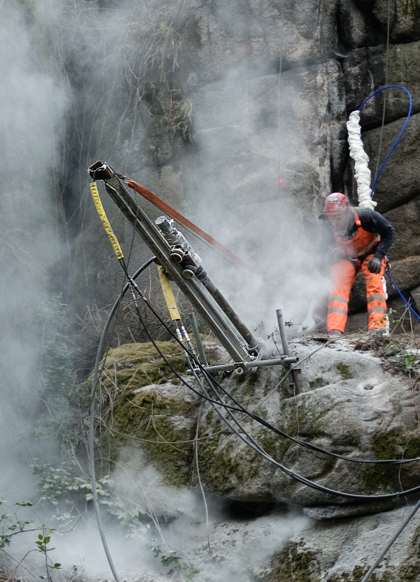 Setzen von Felsankern (Heidelberg, Russenfelsen)